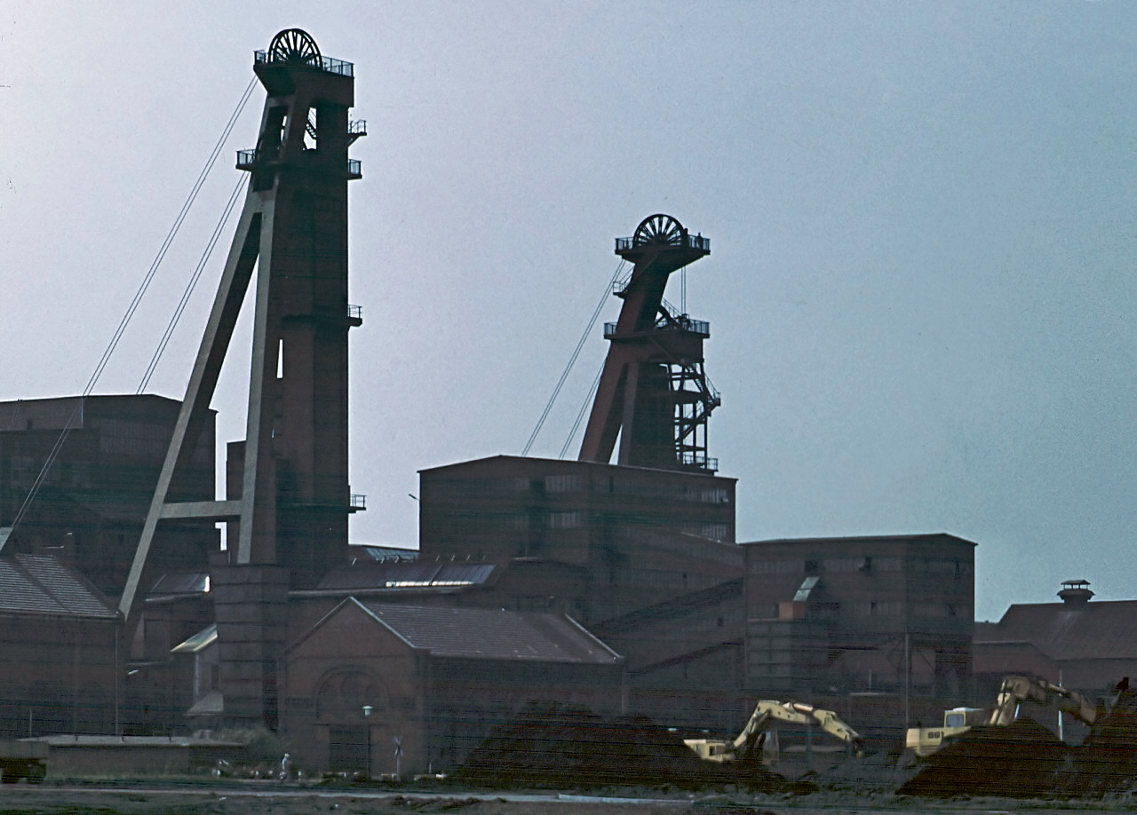 Grillo 1/2, Fördergerüste der Zeche Monopol in Kamen, Nordrhein-Westfalen, vom Hemsack aus gesehen.